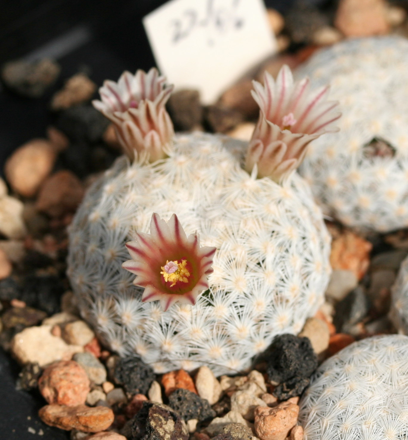 Mammillaria egregia SB30